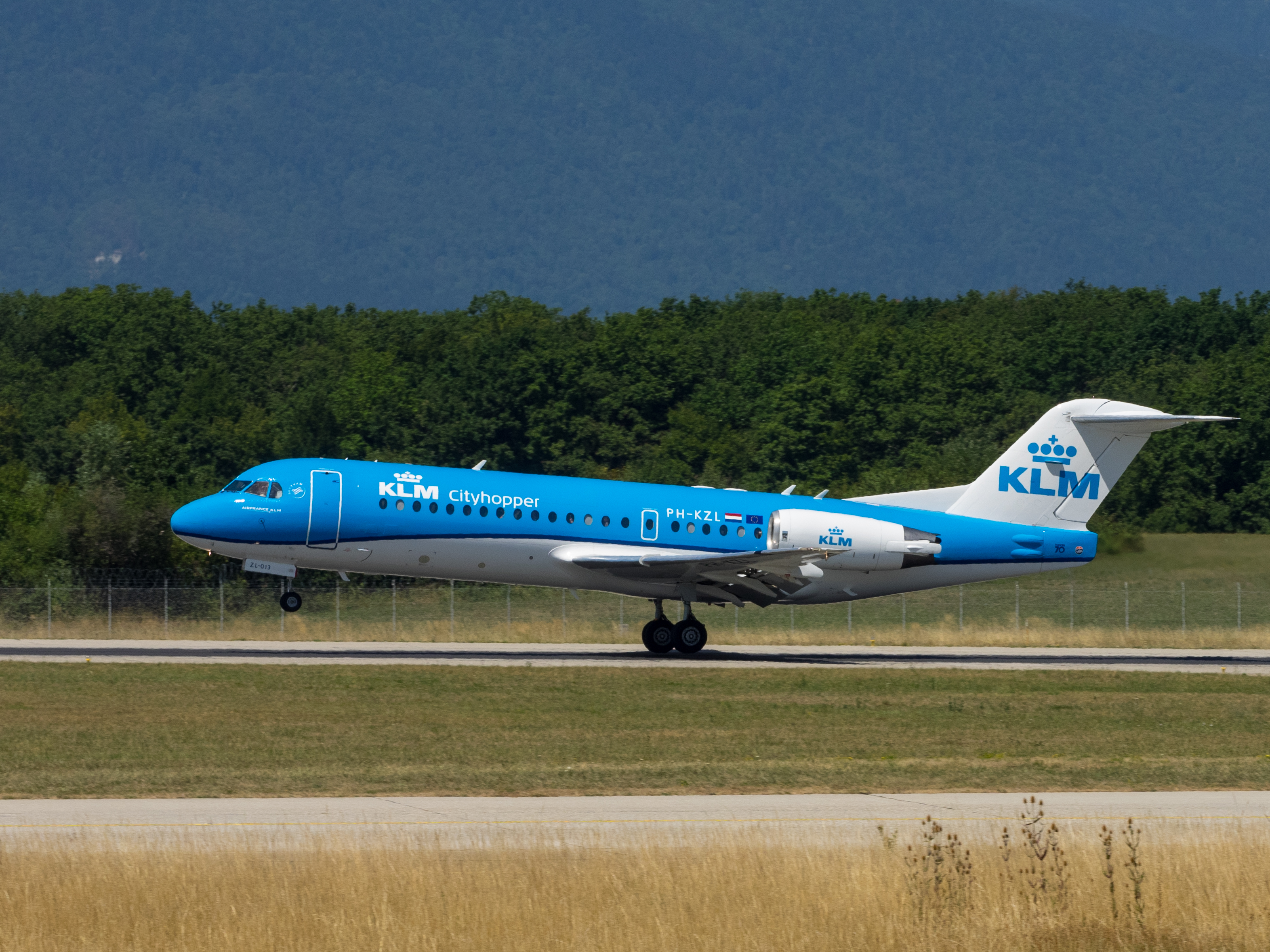 GVA 03.08.2015